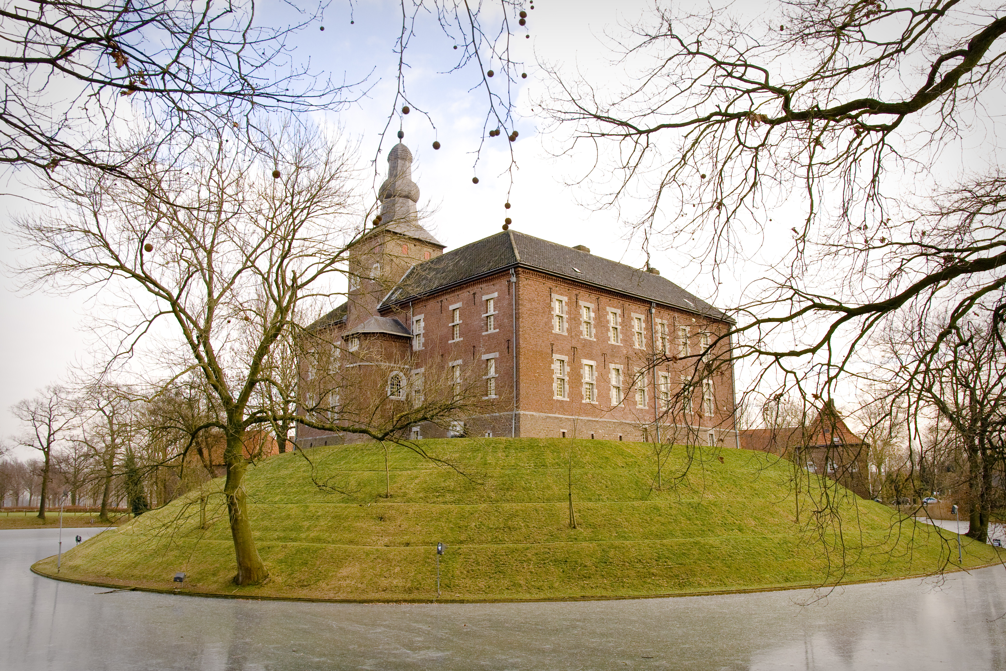 Kasteel Limbricht, in Limburg (Nederland)